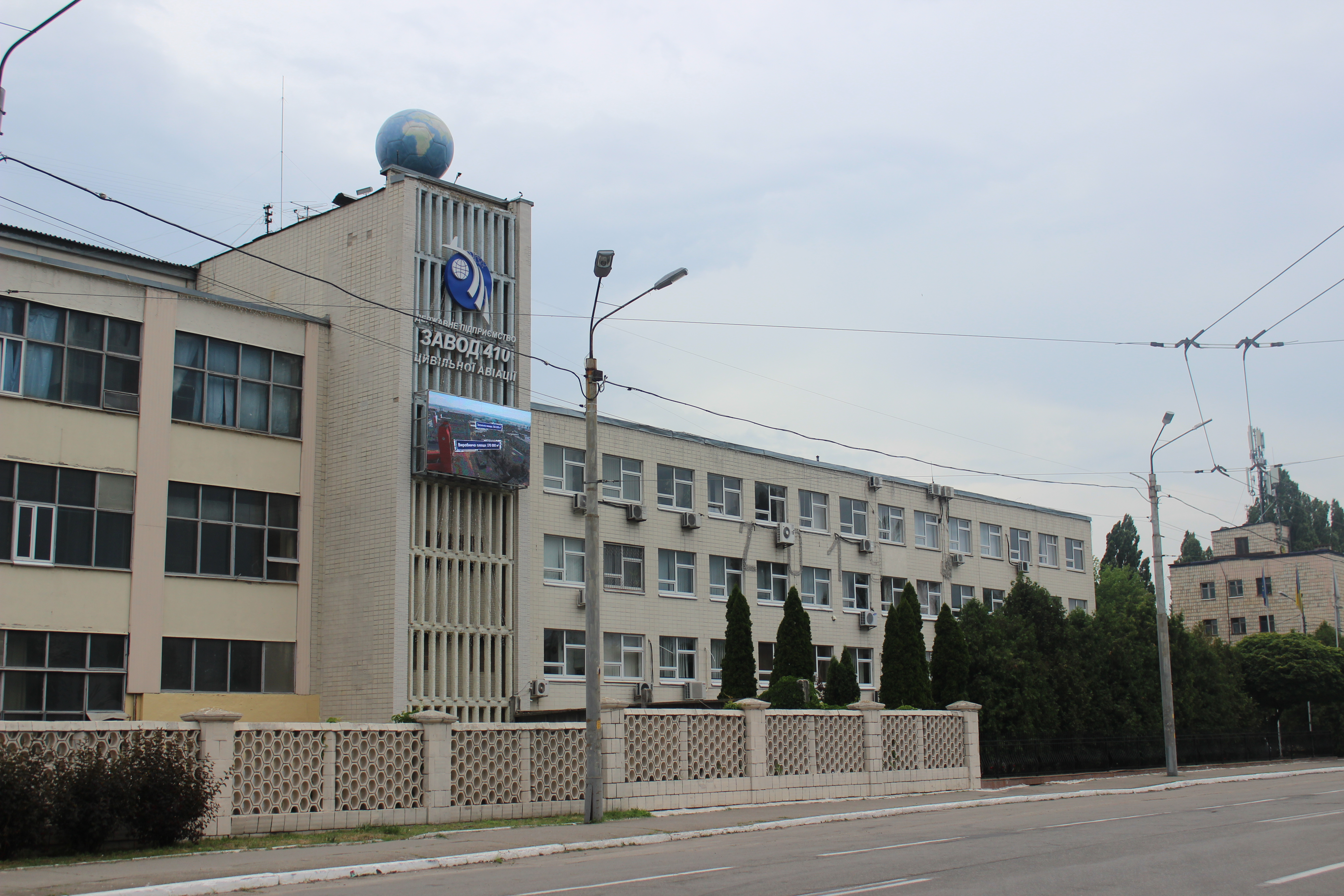 Підприємство авіаційної промисловості України, розташоване в Києві, що здійснює діагностику, ремонт, технічне обслуговування, переобладнання та модернізацію літаків і вертольотів.